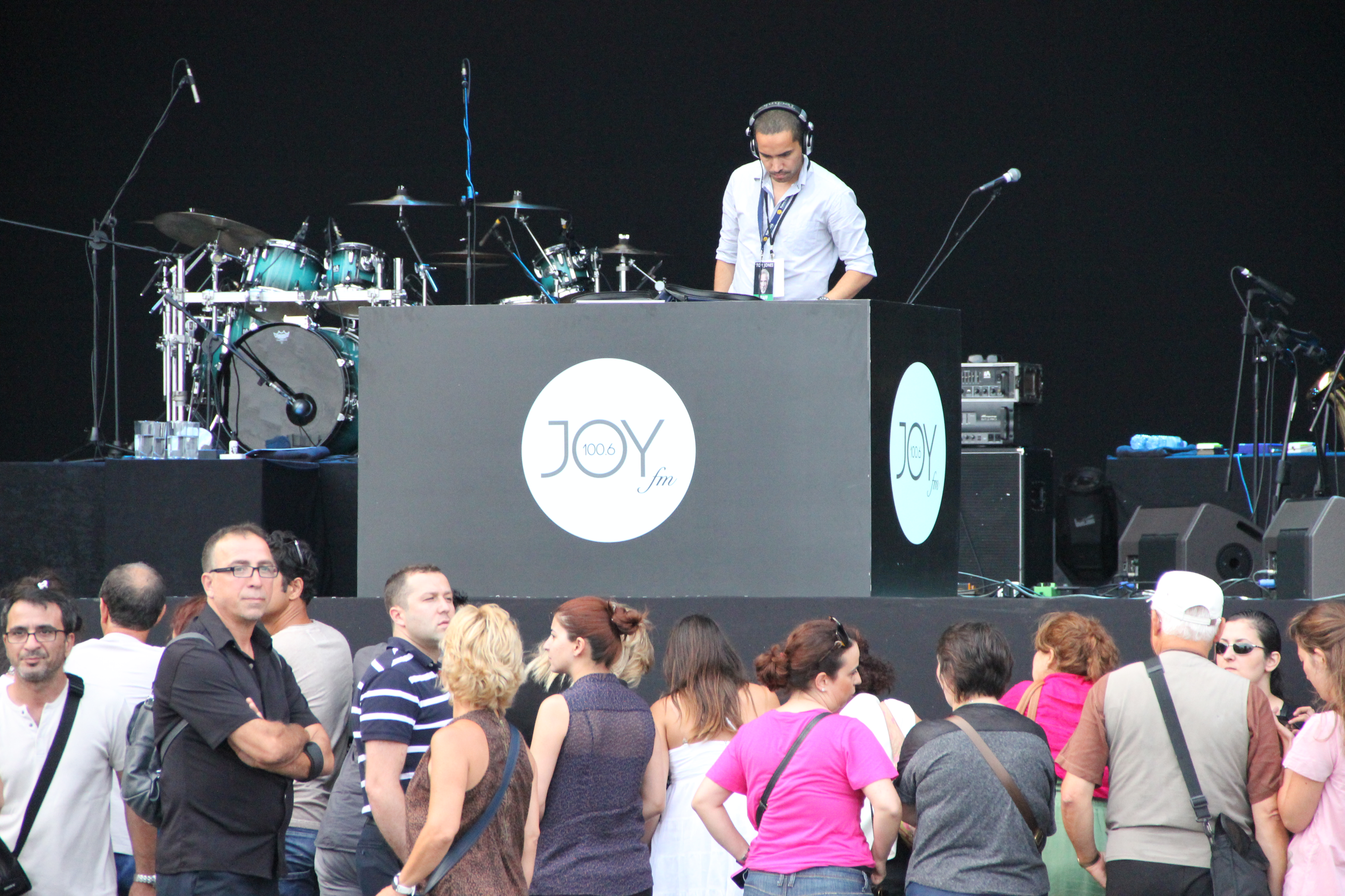 Tom Jones Istanbul konseri, Kuruçeşme Arena, 2012